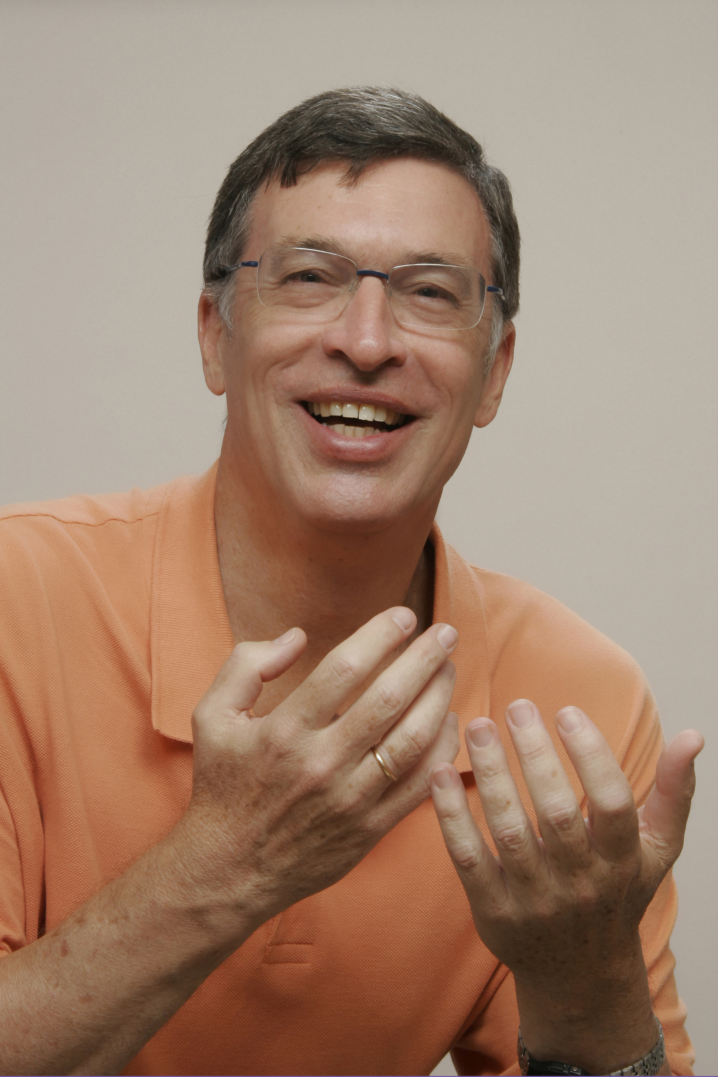 אבשלום קור